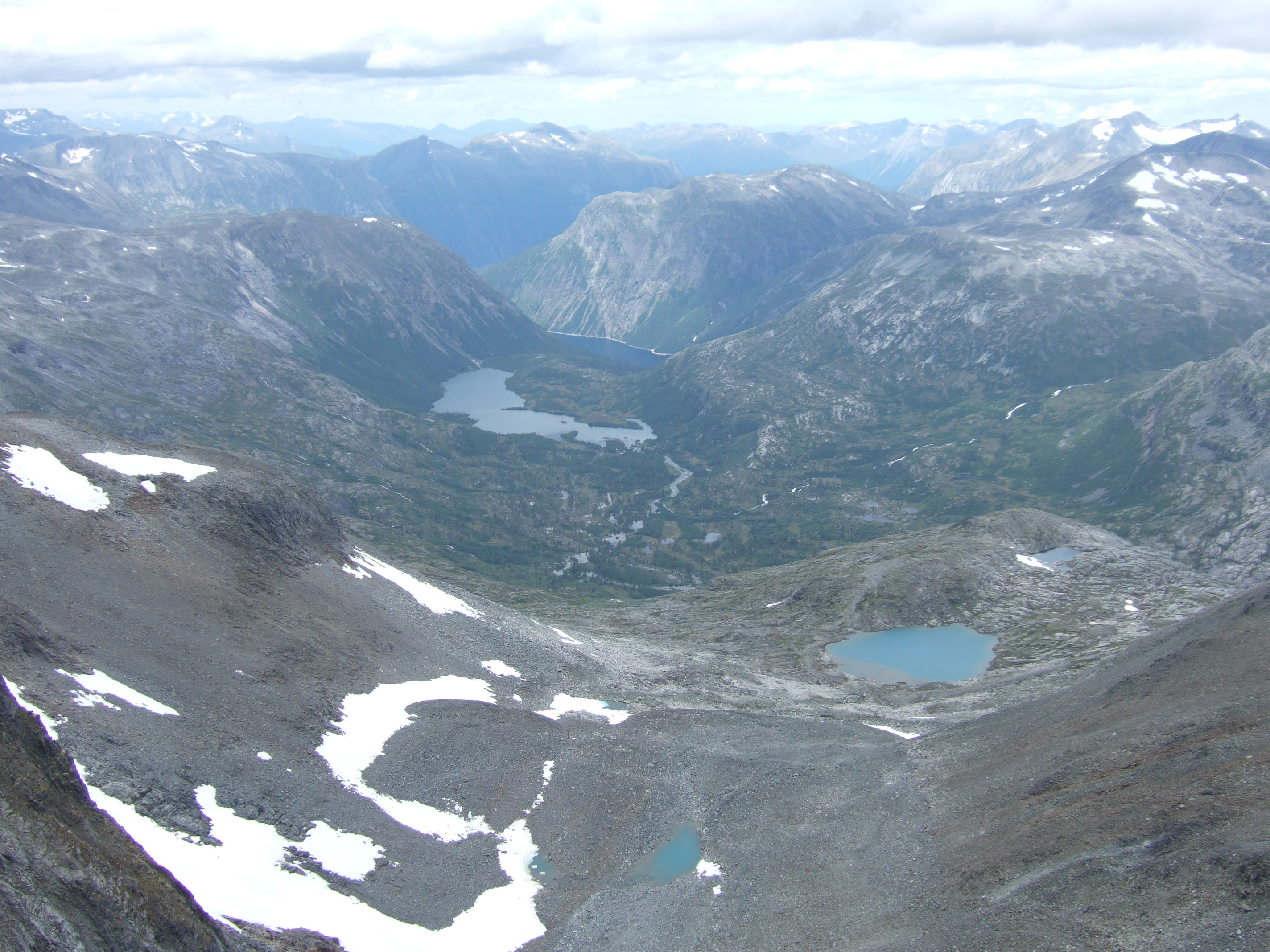 Reindalen in Møre og Romsdal seen from Naushornet. Zakariasvatnet lake can also be seen.